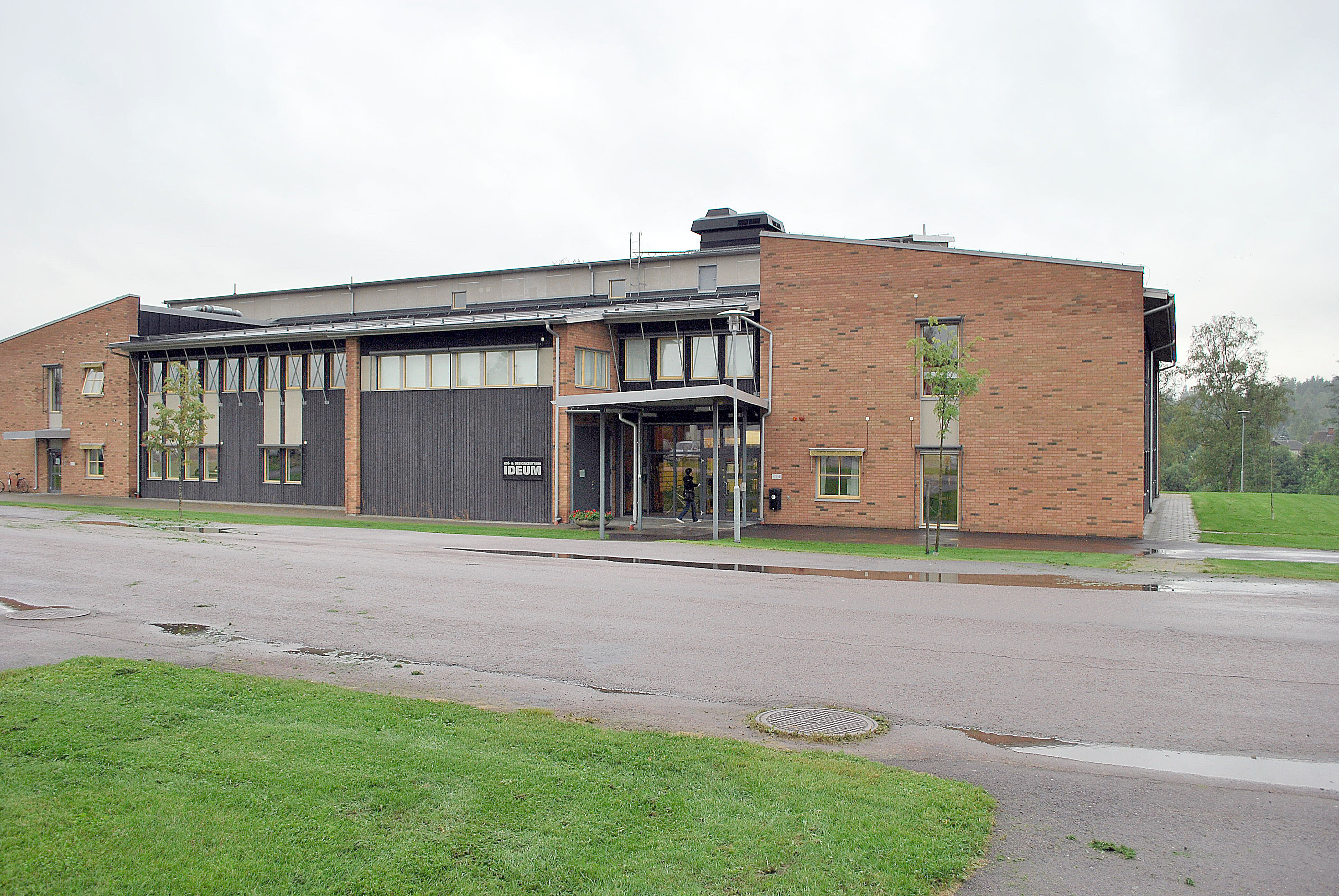 Huset Idéum i Sunne som bland annat har undervisningslokaler för Broby Grafiska utbildning.